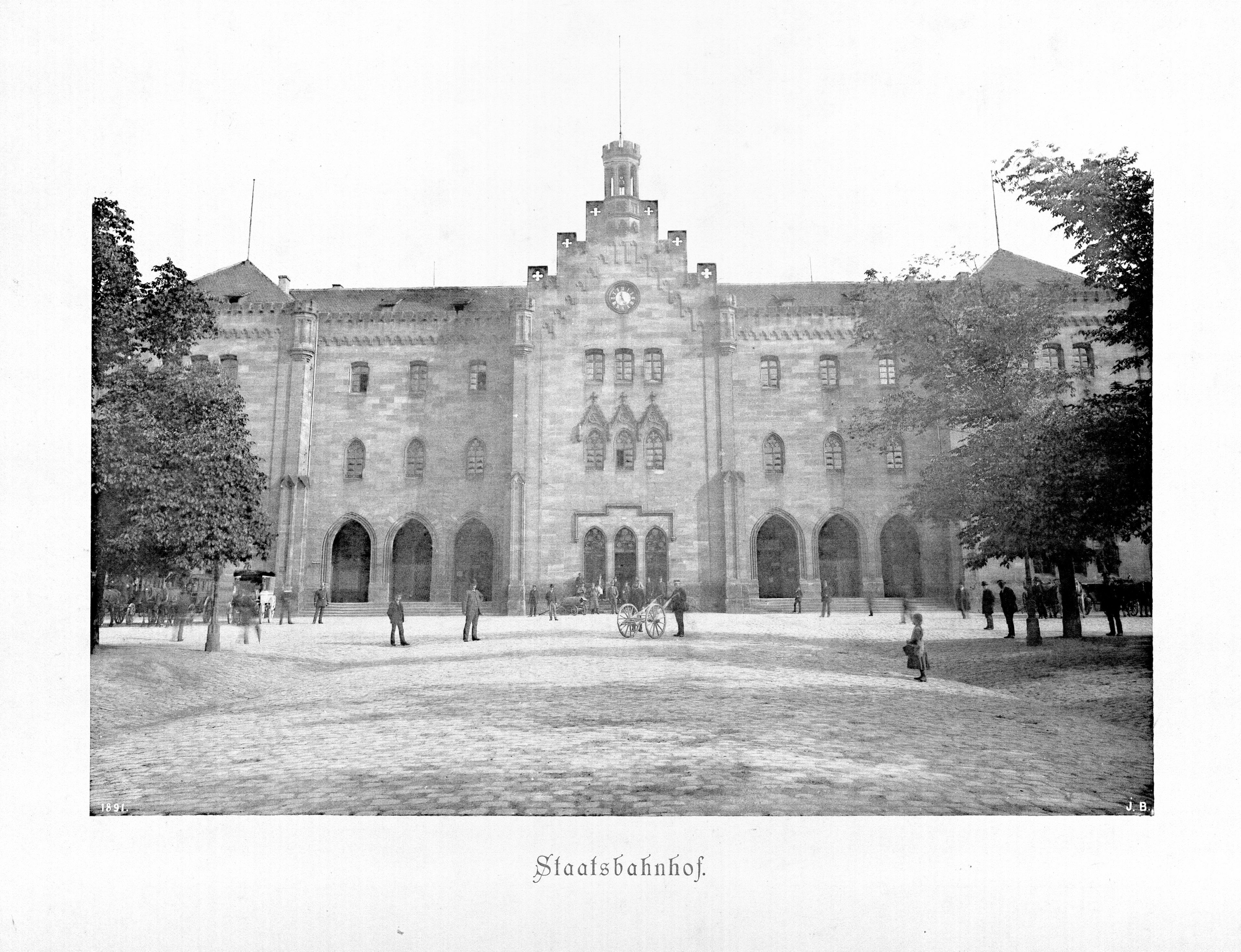 Staatsbahnhof. (vor dem Umbau) aus dem Band Die Baudenkmäler der Stadt Nürnberg. Erste Nürnberger Lichtdruckanstalt & Kunstverlag Brunner. Nürnberg 1891. 2011 digitalisiert von der Ohm-Hochschulbibliothek Nürnberg. Exemplar mit der Signatur: Nürnberg, Ohm-Hochschulbibliothek -- 901/2.213 / M a